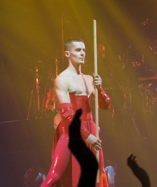 Timeless 2013, tournée de Mylène Farmer: danseur Mehdi Baki